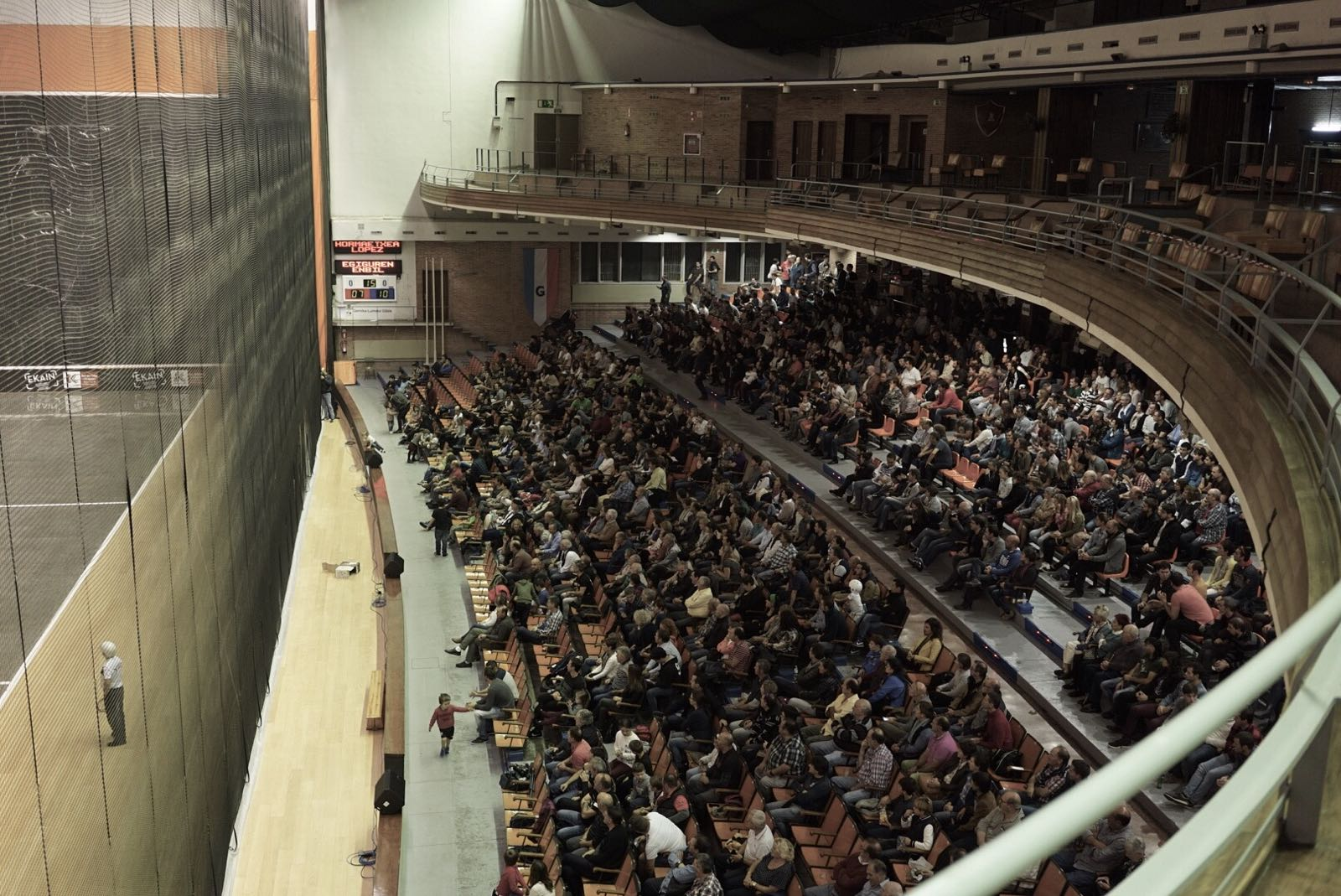 Gernikako Jai Alai pilotalekua 2016ko urrian